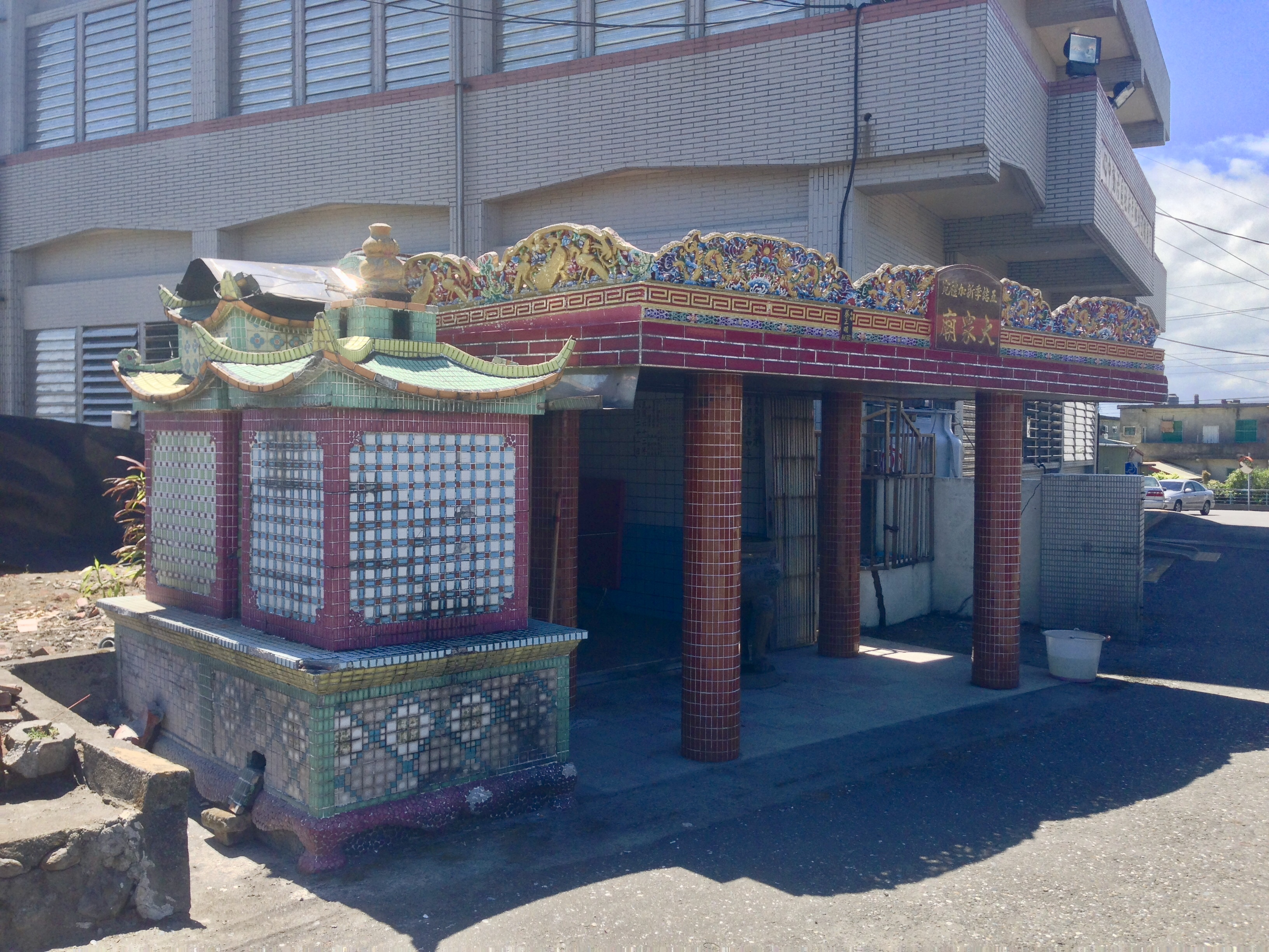 五結季新加禮宛大眾爺廟斜照